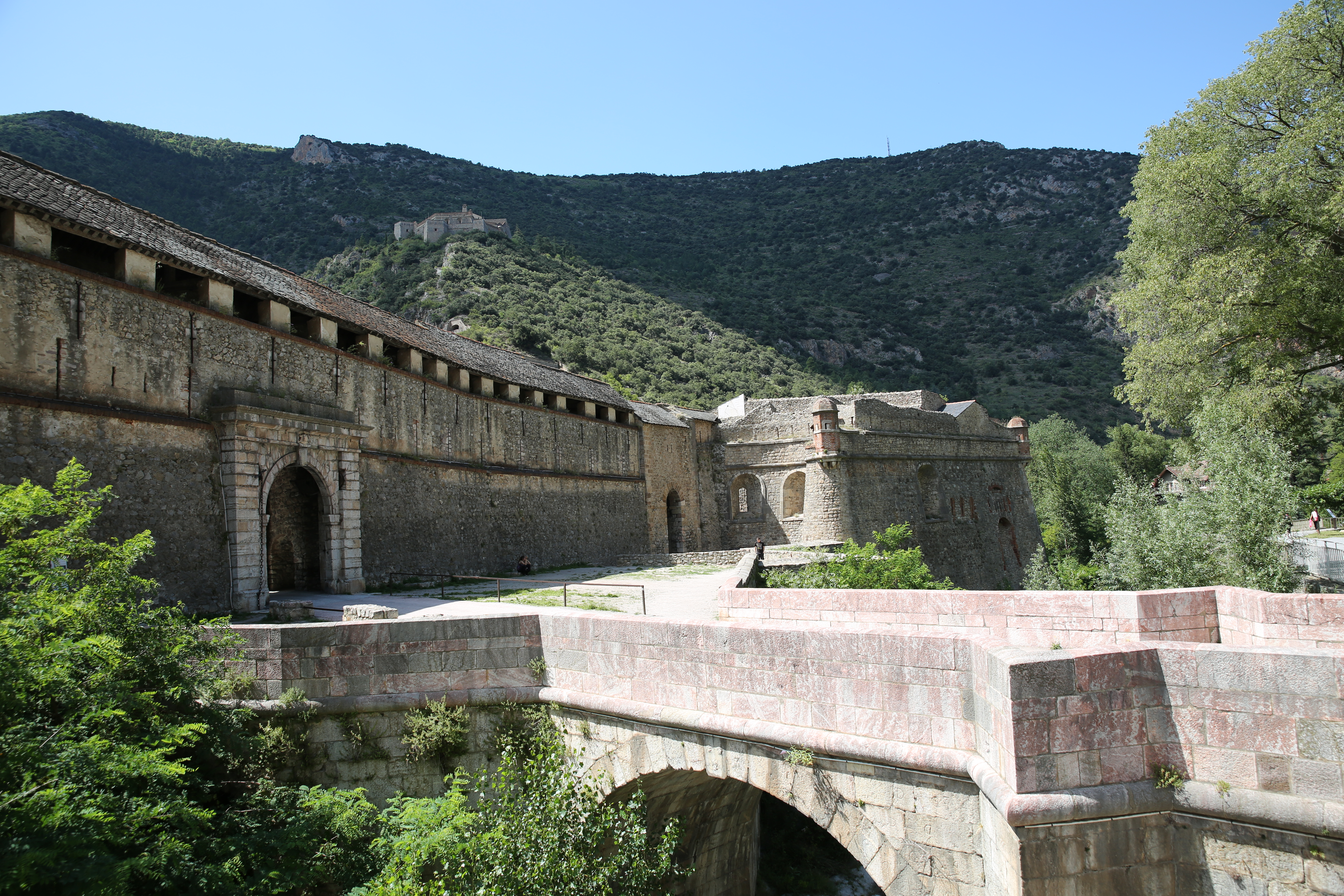 Fortification Villefranche-de-Conflent